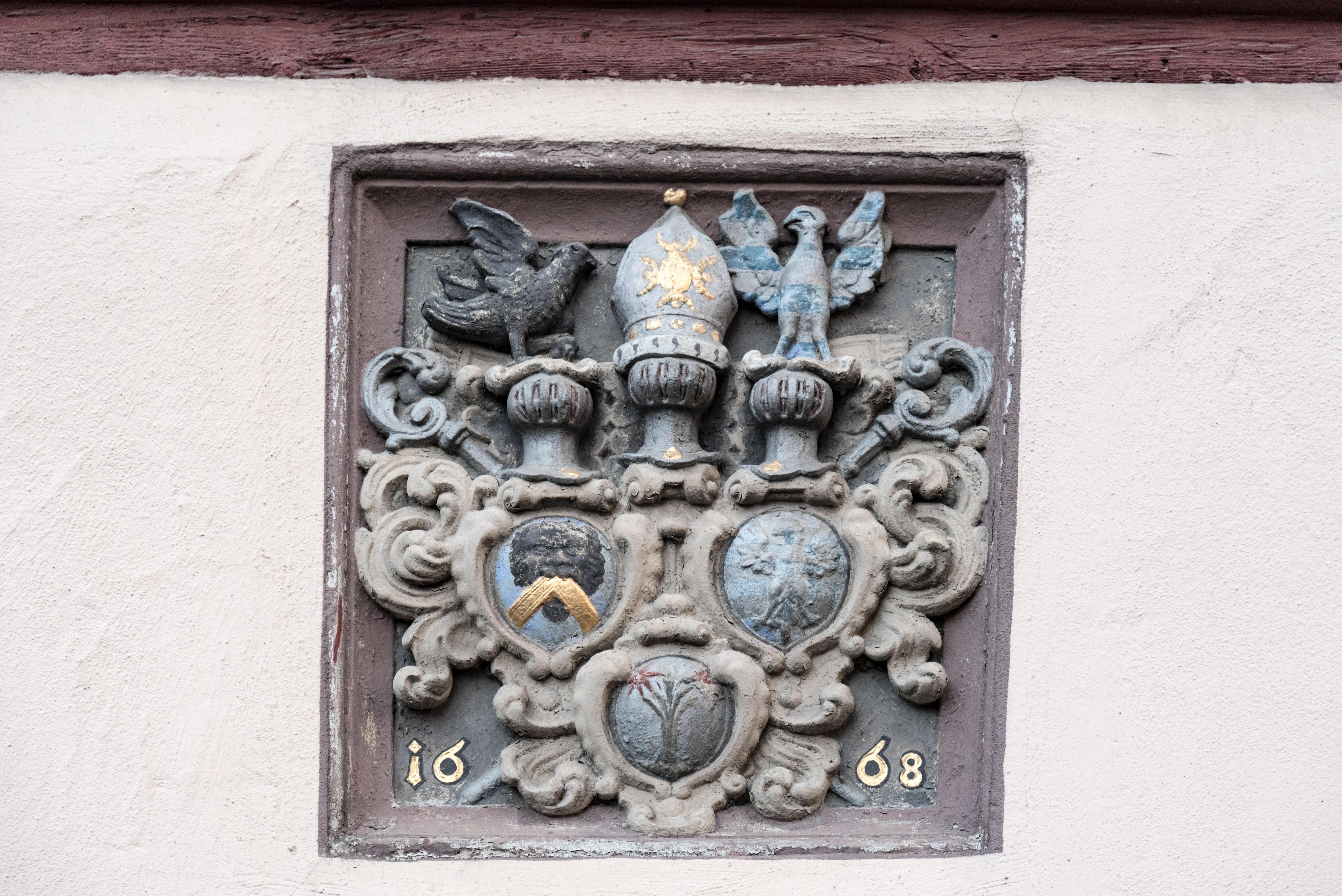 Somerach, Hauptstraße 20